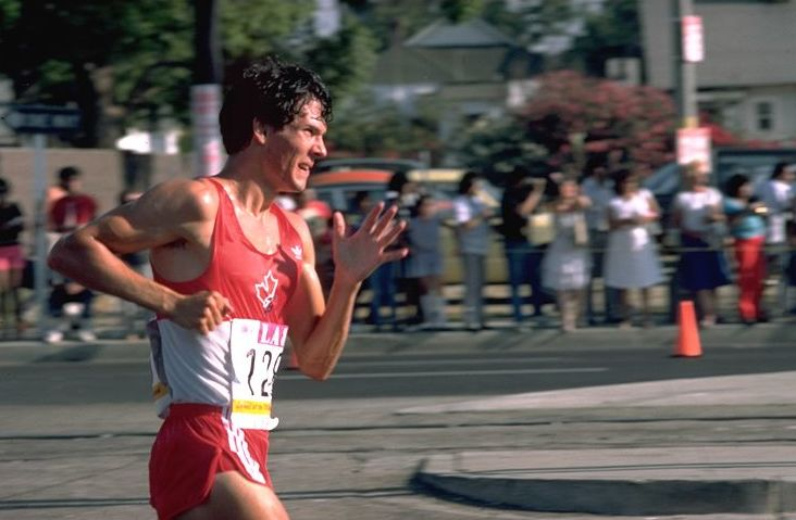 Guillaume Leblanc (Canada), Los Angeles, 7 juillet 1984, 20km marche des Jeux Olympique